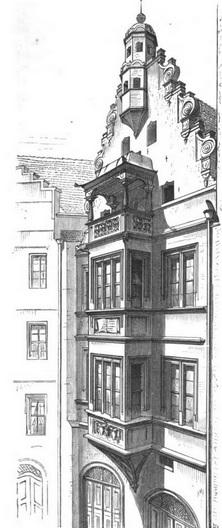 Abgebildet ist ein typisches Gebäude der Renaissancezeit in Leipzig. Hier ein Haus in der Hainstraße